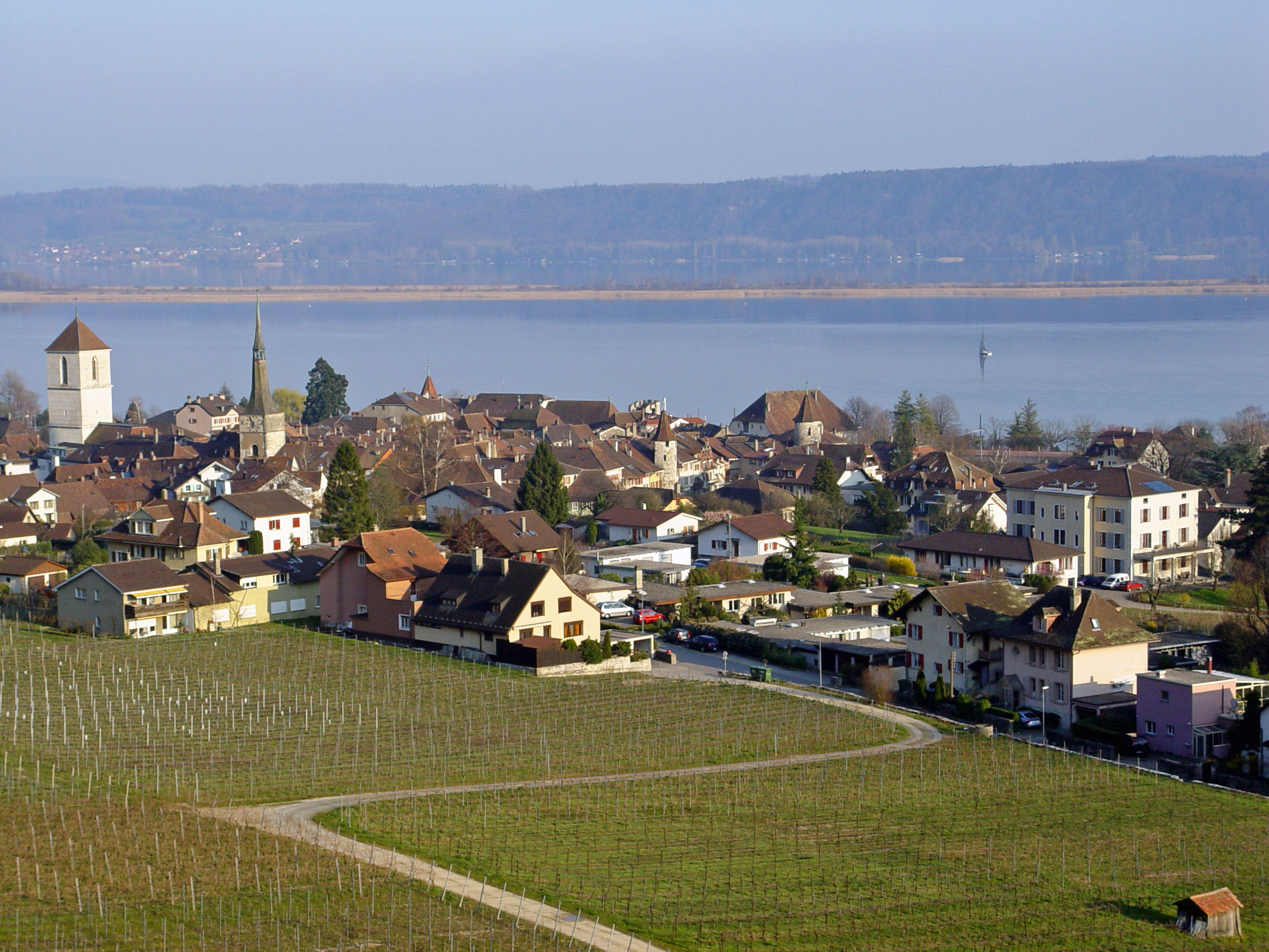 La Neuveville mit Bielersee vom Weinberg gesehen